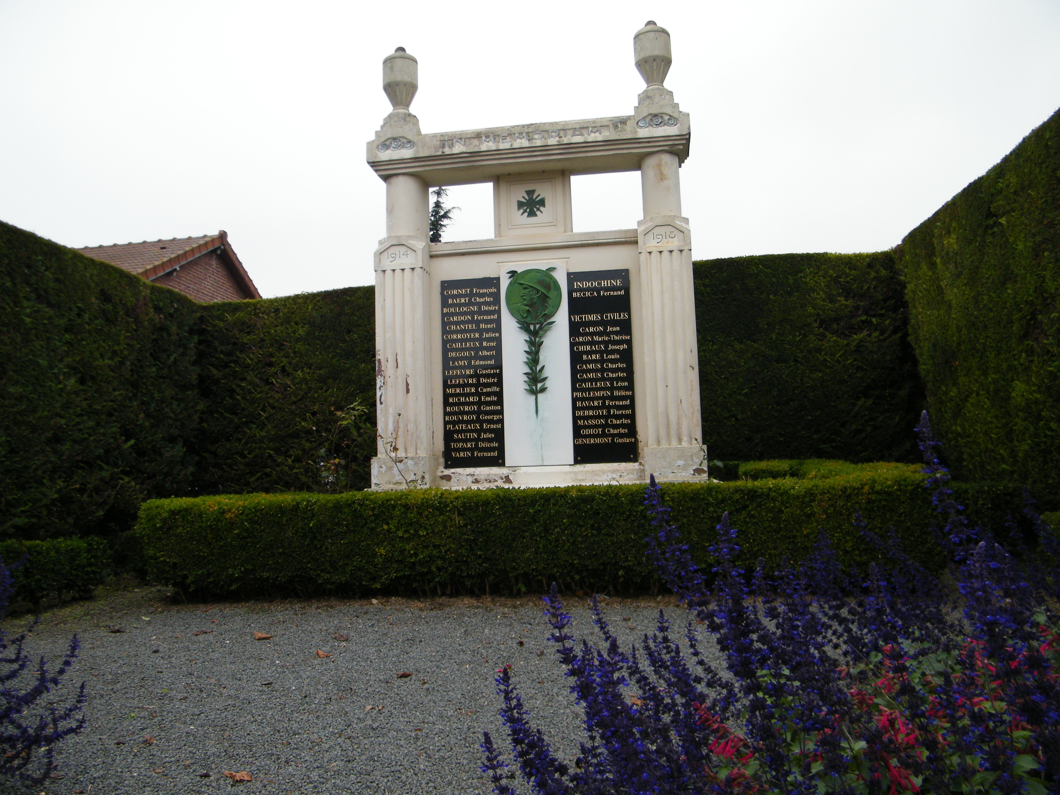 Monument.